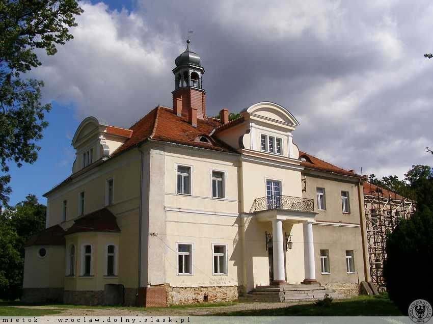 Konary - pałac, park pałacowy (zabytek nr 267/730/Wł)